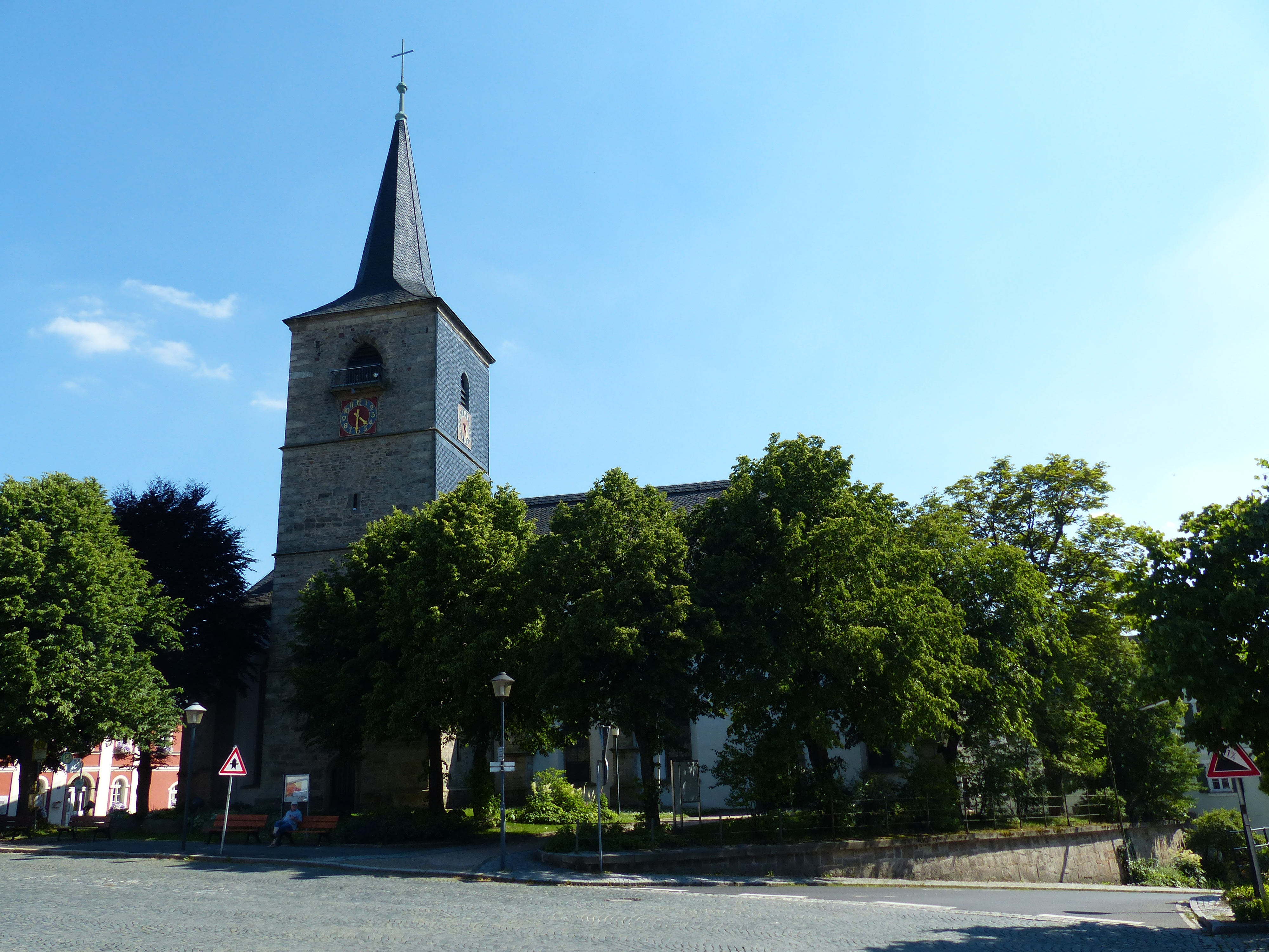 Baudenkmal in der oberfränkischen Stadt Weißenstadt